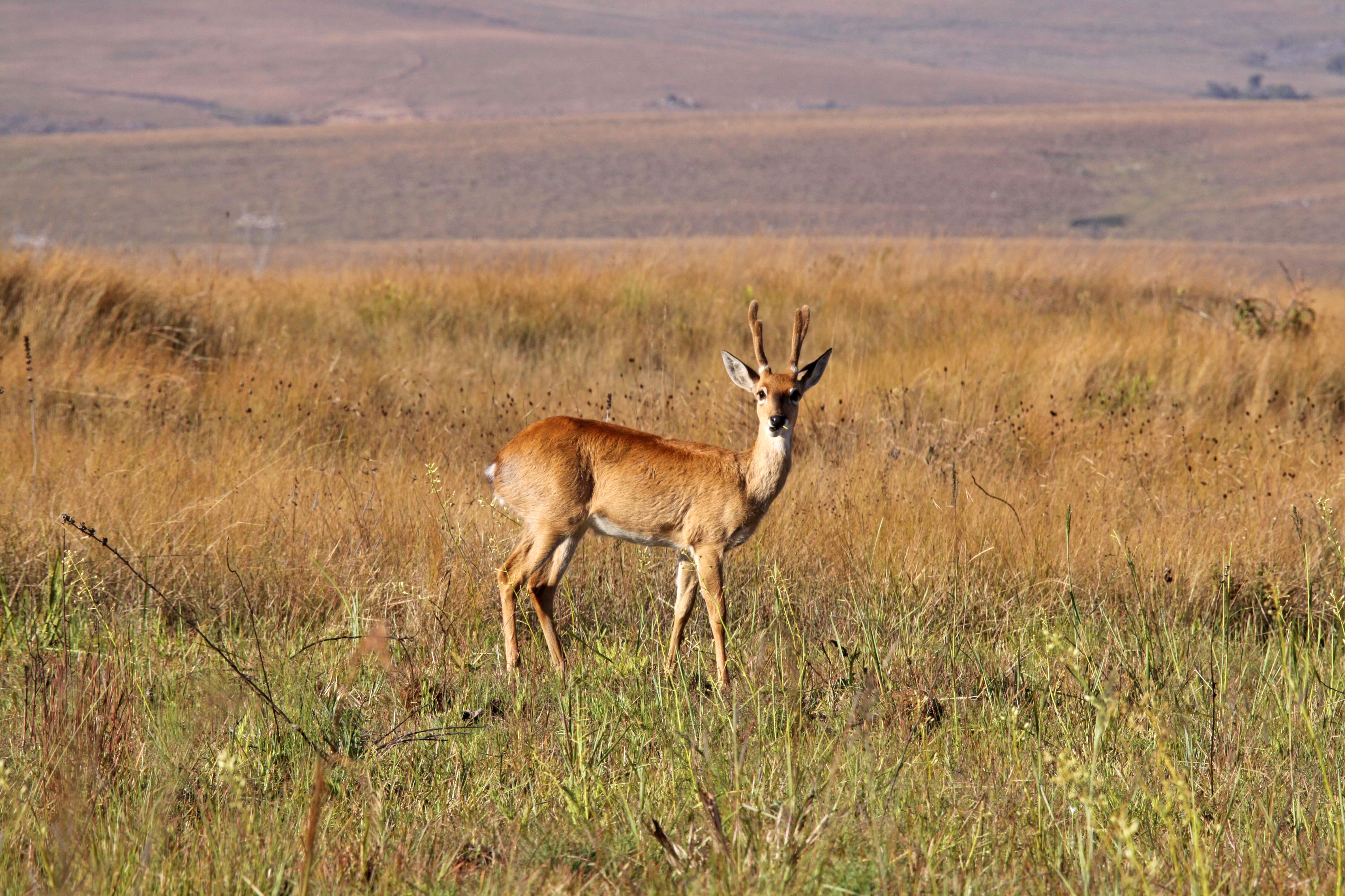 Veado Campeiro no Parque Nacional da Serra da Canastra